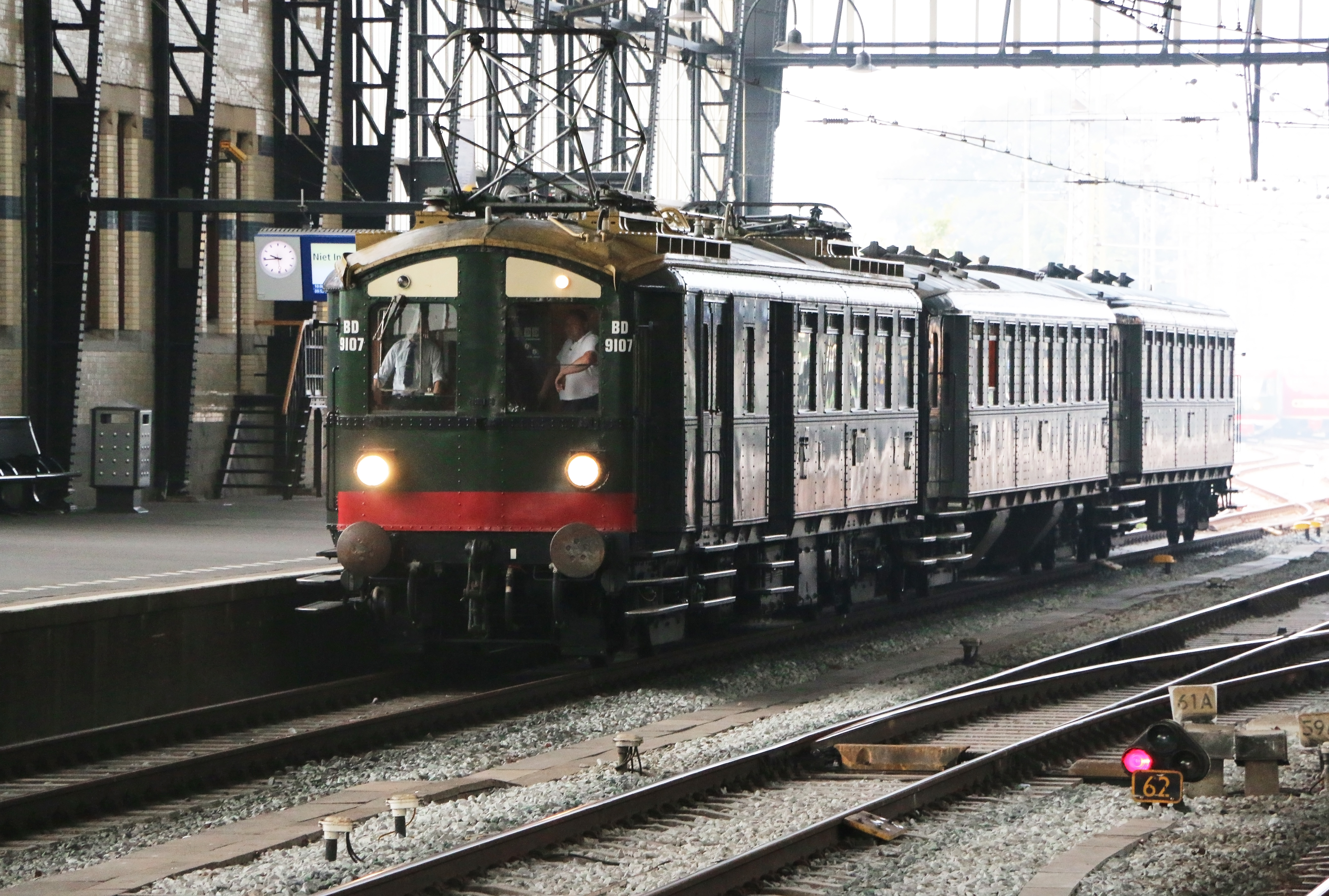 Even na half tien rangeert het Blokkendoos materiaal '24 in Haarlem als voorbereiding op zijn eerste dienst Haarlem-Amsterdam vanwege de viering van het 175-jarig bestaan van deze verbinding. De waas bij de koplampen verraadt dat de dag nogal mistig begon.